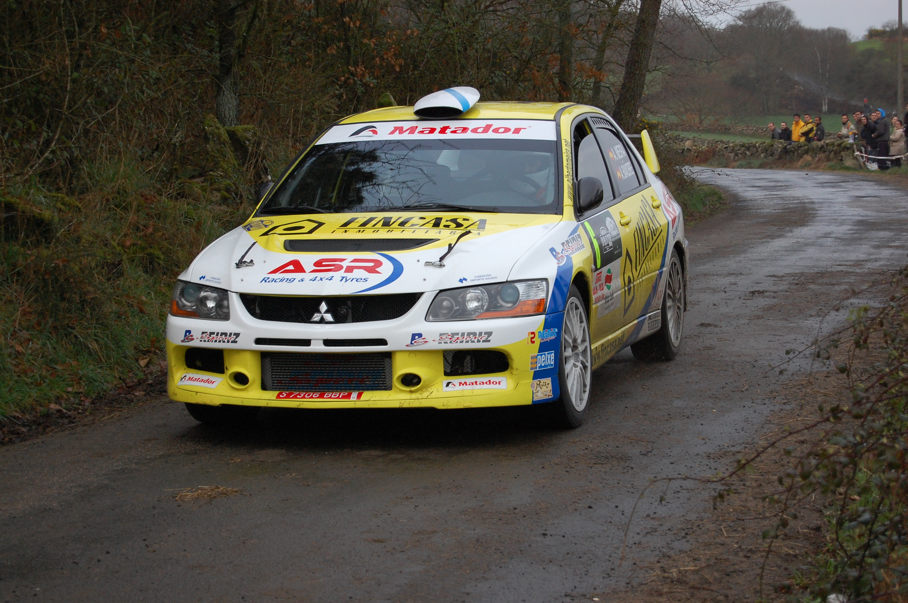 Alberto Meira. Spanish rallye drivers